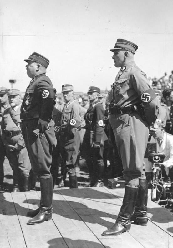 Stabschef der SA Röhm mit dem SA-Gruppenführer Heines